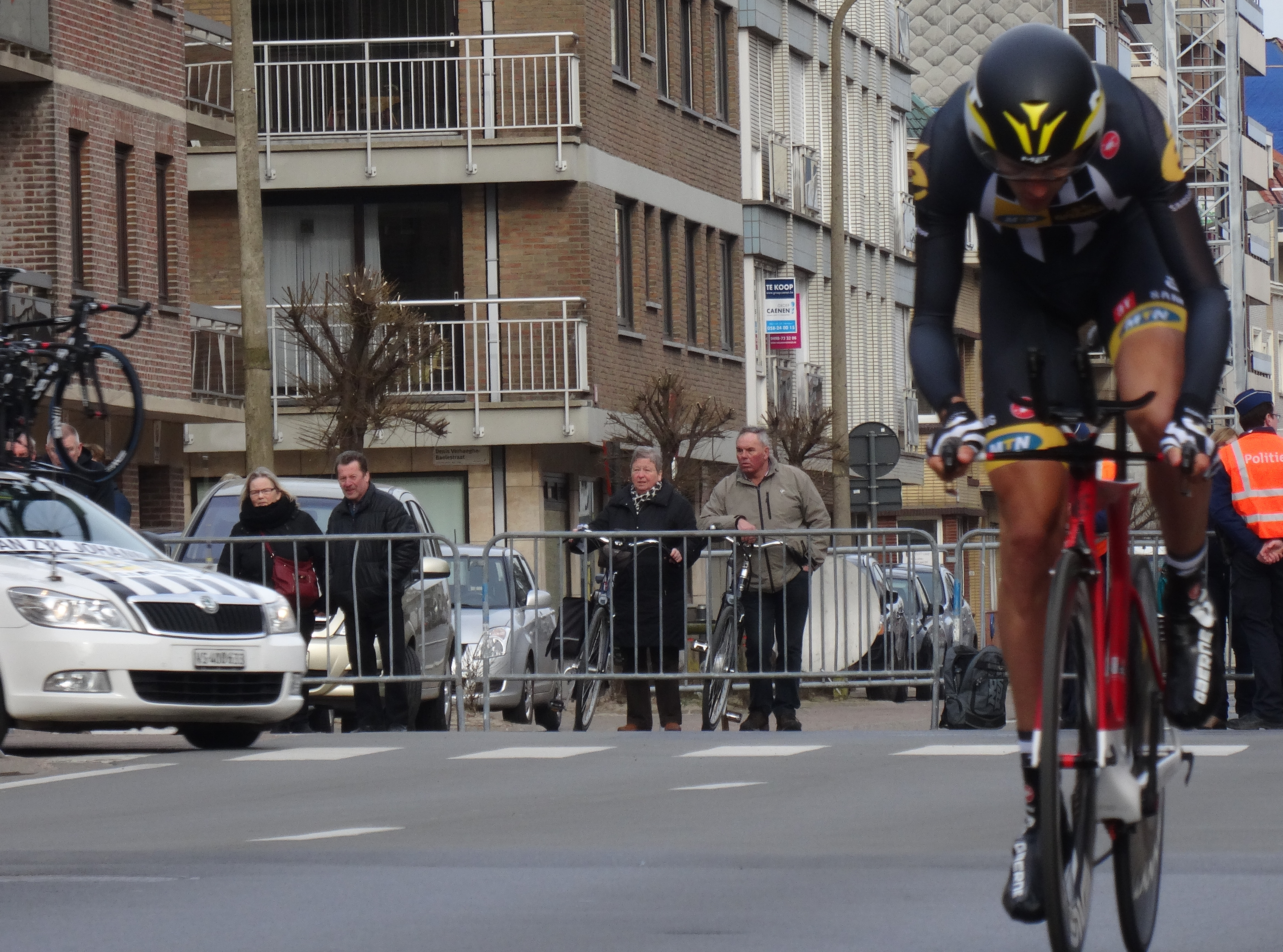 Prologue de Driedaagse van West-Vlaanderen 2015... Depicted person: Johann van Zyl Depicted team: MTN-Qhubeka